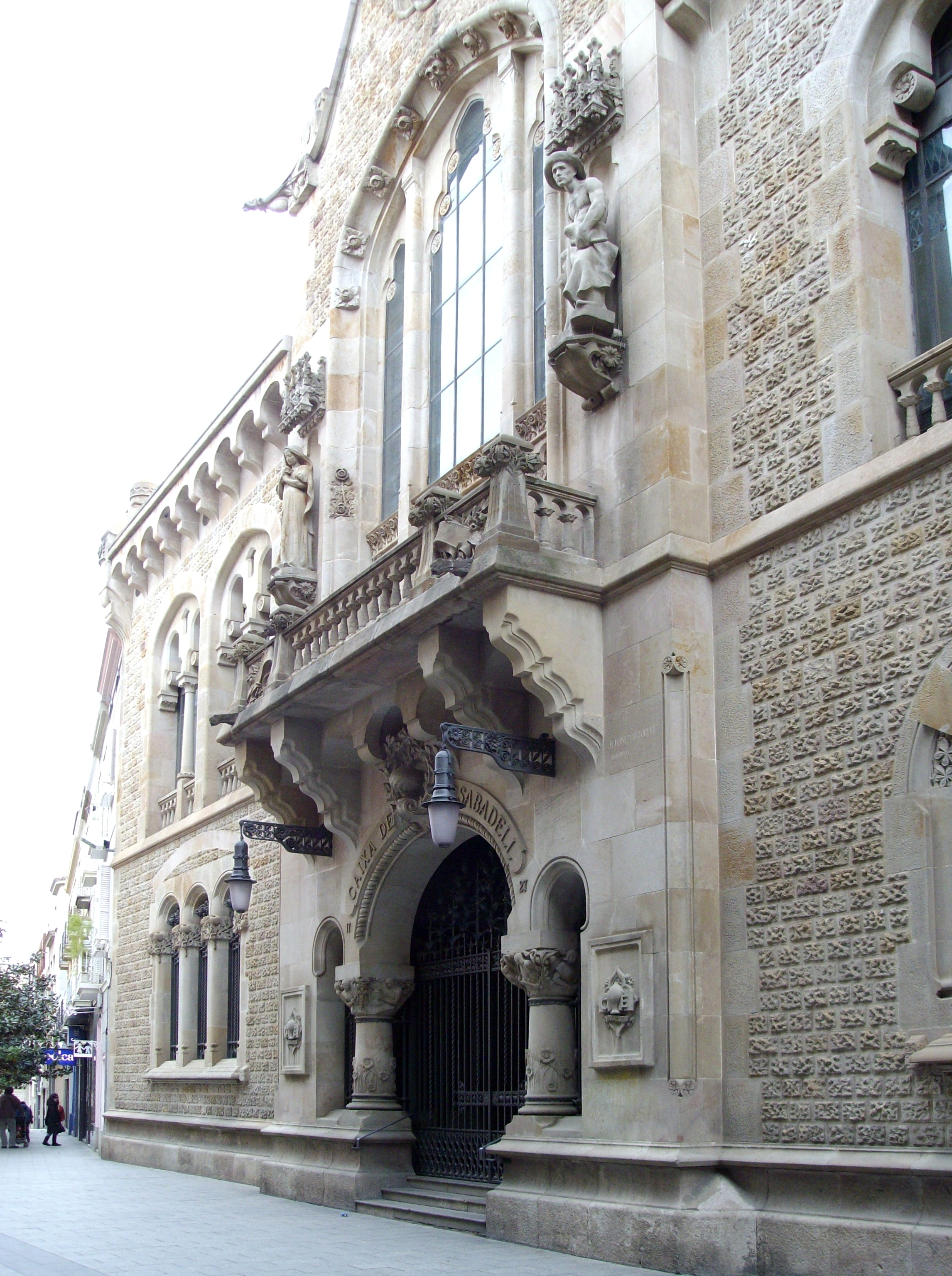 Sede central de Caixa Sabadell, construida entre 1905 y 1915 per Jeroni Martorell i Terrats, situada en la calle Gràcia, 17-27, de Sabadell, Barcelona (España).